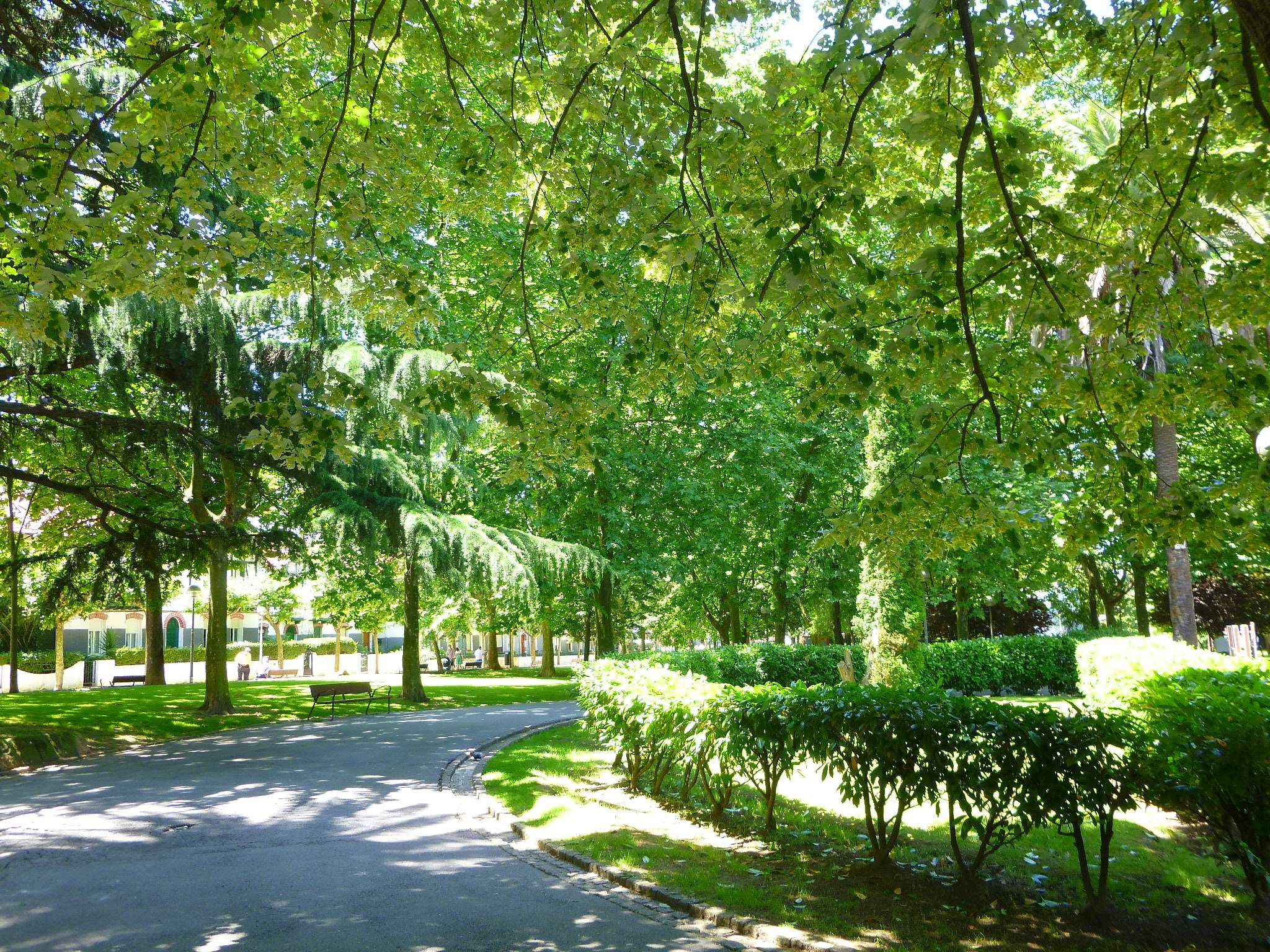 Barakaldo (Bizkaia)